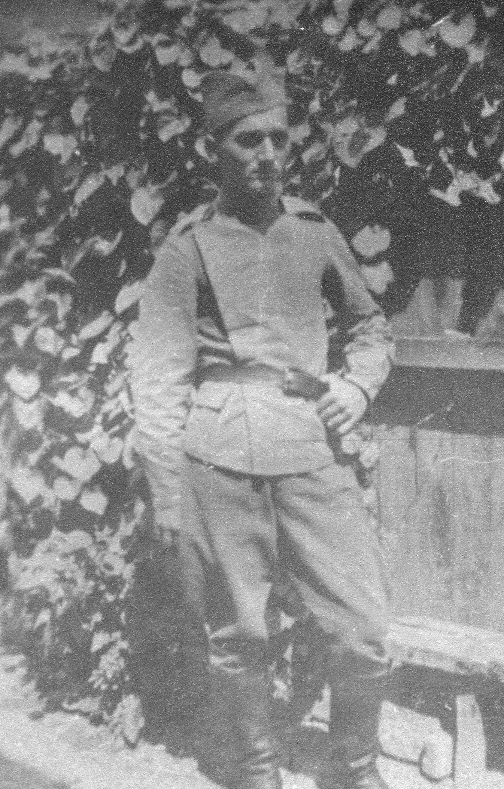 Joža Vlahović (Zagreb, 3. ožujka 1916. - Zagreb, rujan 1941.) hrvatski političar, sekretar Pokrajinskog komiteta SKOJ-a za Hrvatsku i član CK Hrvatske.